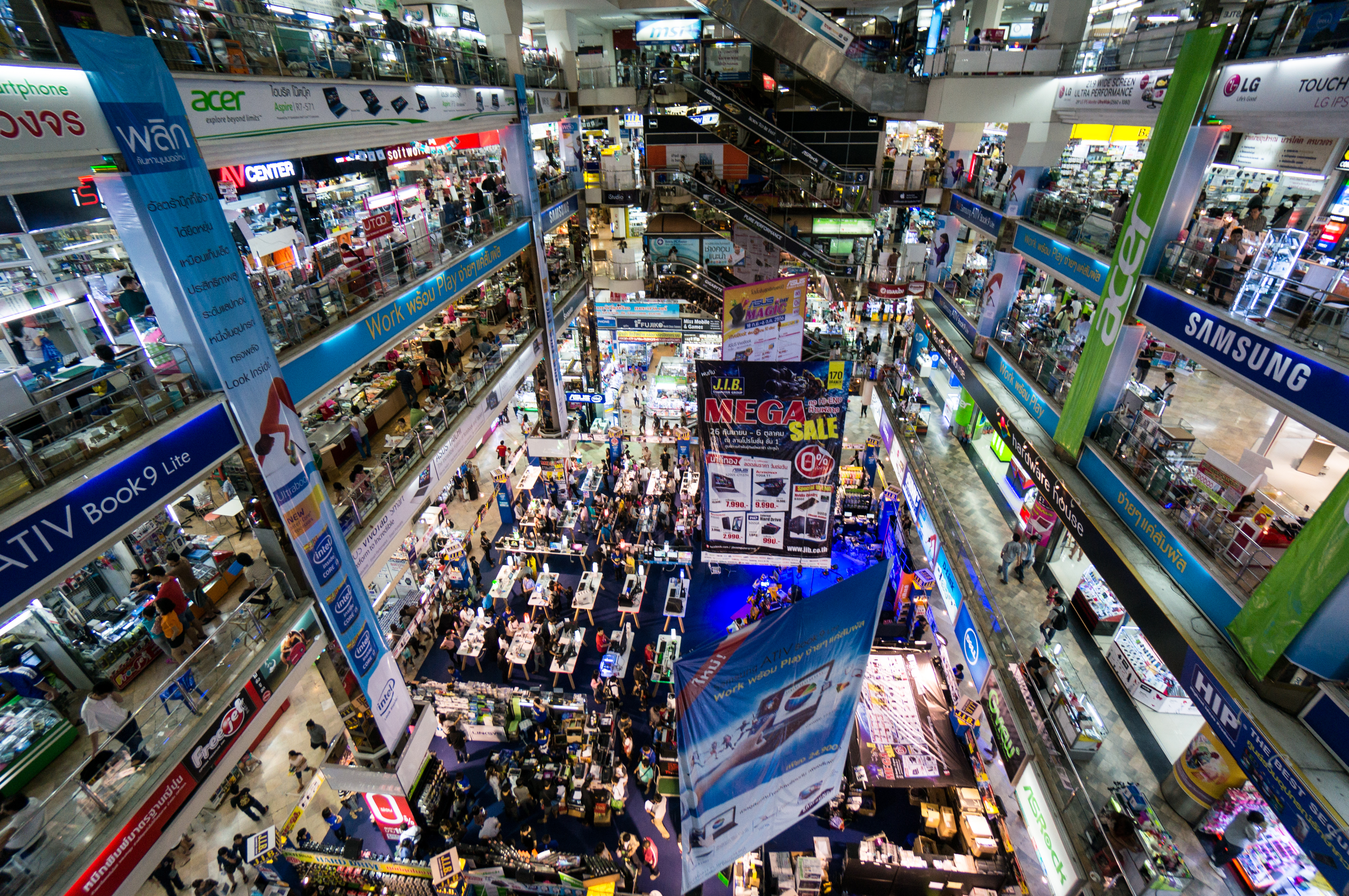 Interior of Pantip Plaza in Bangkok